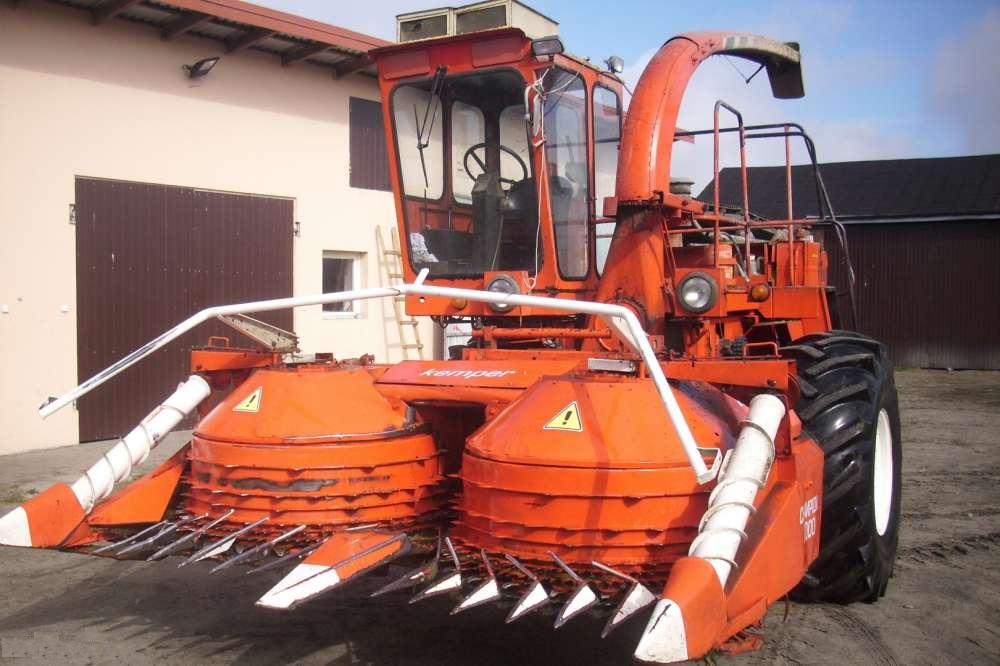 przód